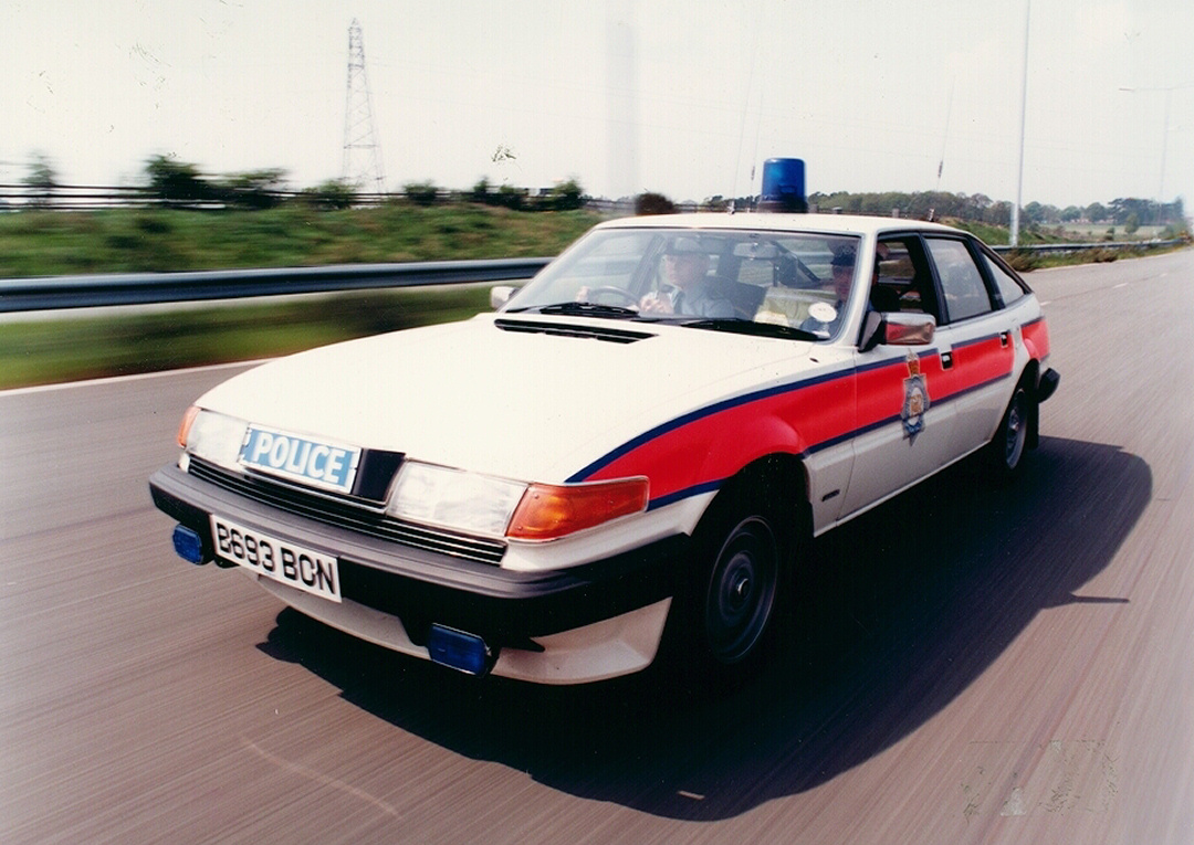 Rover SD 1